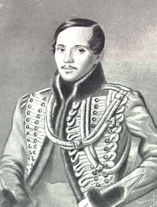 Bild Michail Lermontow. Fundstelle